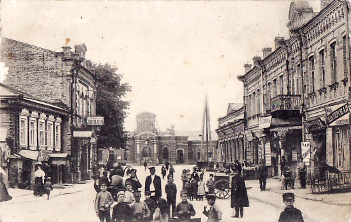 Гомель.Улица Замковая и Вокзал Гомель дореволюционный